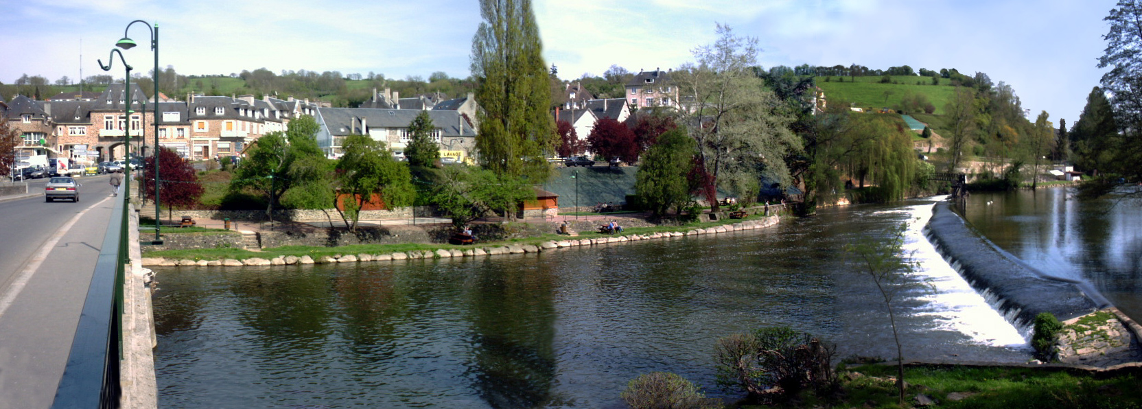 Vue panoramique de Pont-d'Ouilly, sur le fleuve Orne, Calvados, Normandie, Frnce.